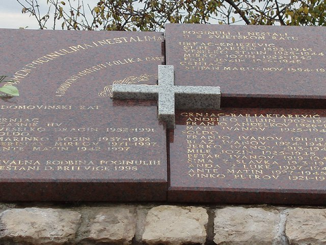 Spomenik u selu Donja Britvica, Bosna i Hercegovina